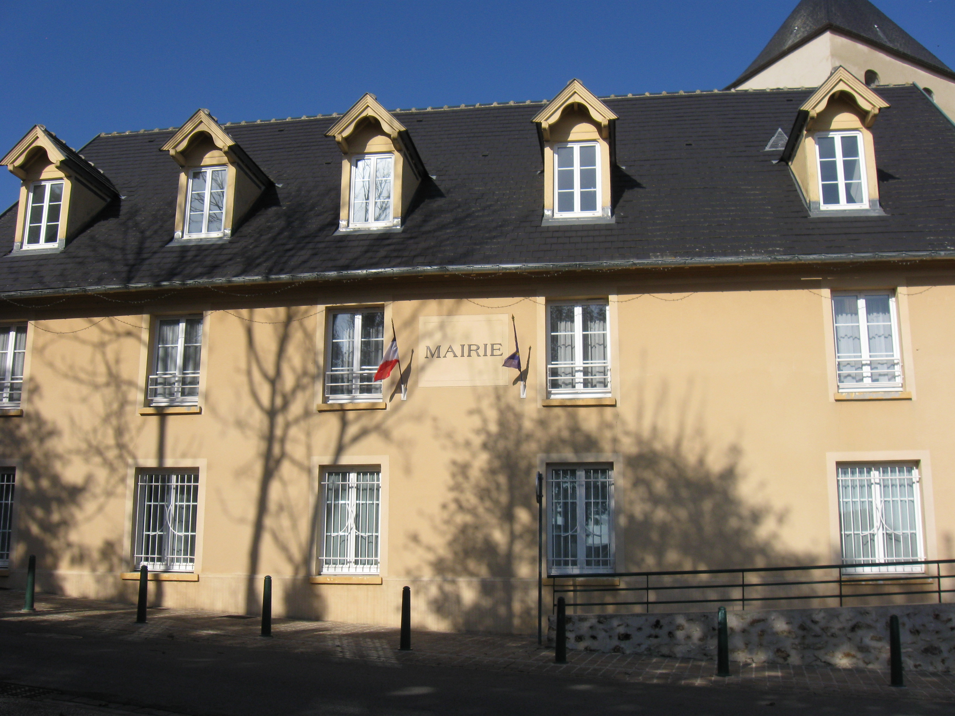 Mairie de Monthyon. (Seine-et-Marne, région Île-de-France).